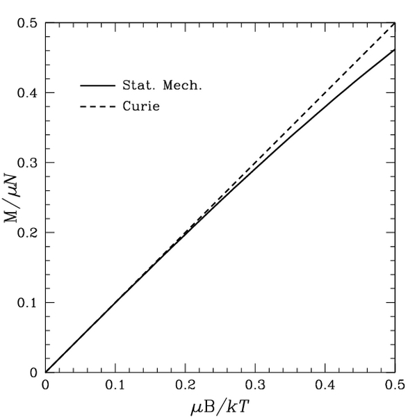 from en